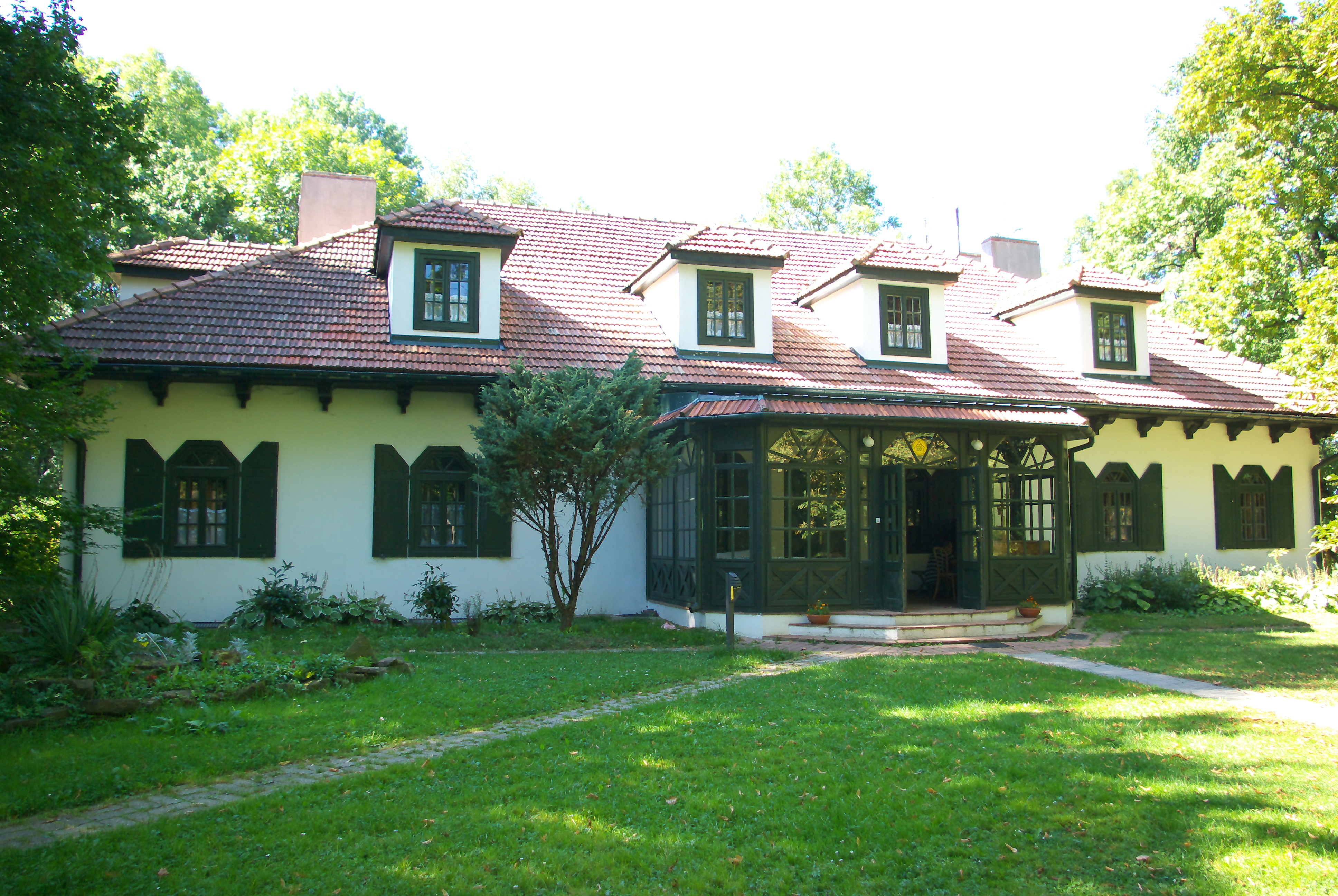 Dwór w Wolej Sękowej. Budynek główny